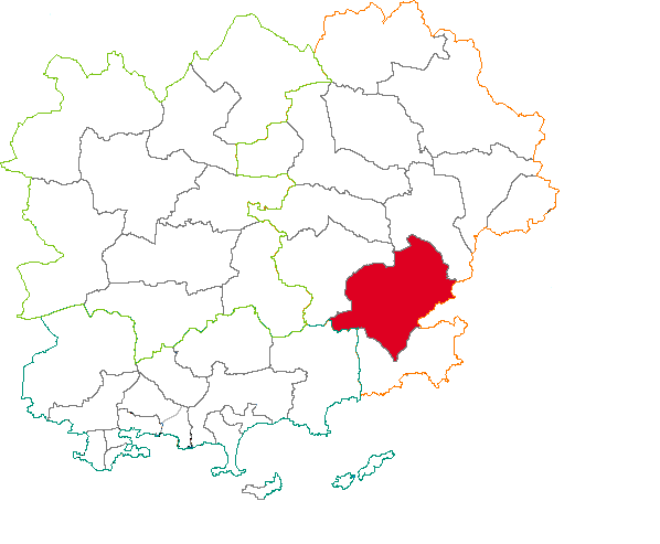 Situation du canton dans le département du Var (83) France